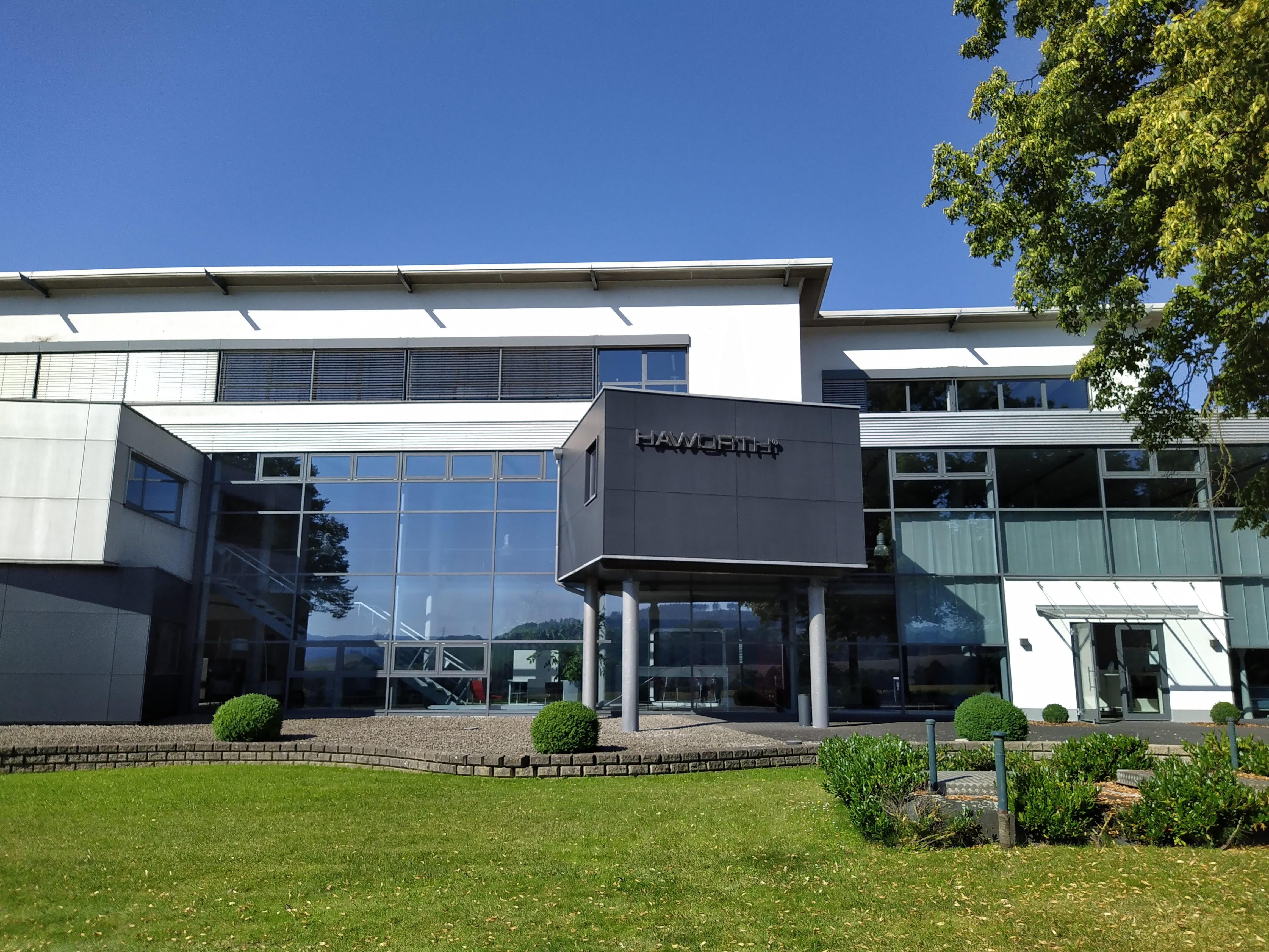 Haworth Werk in Bad Münder (Niedersachsen)